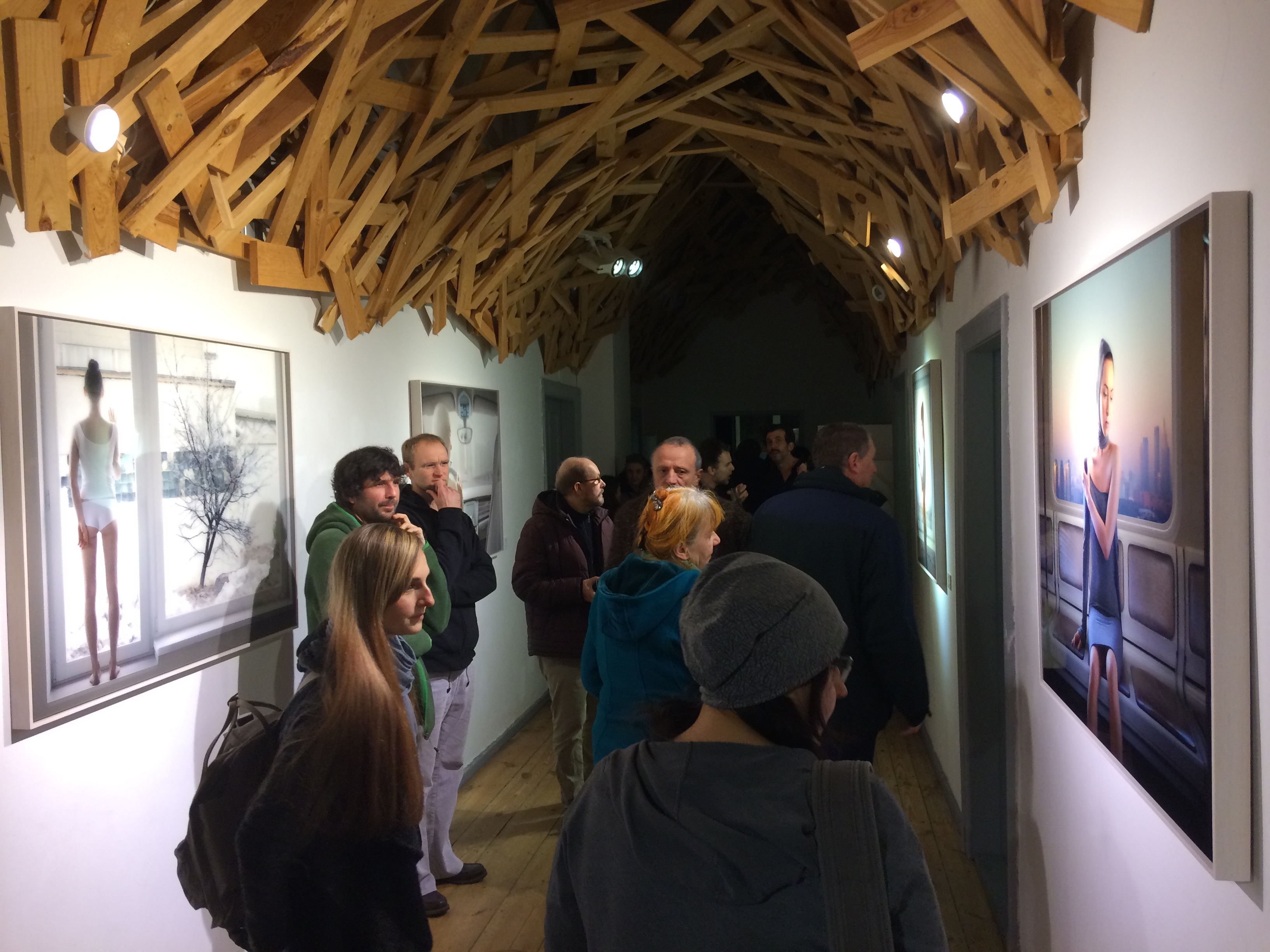 Ausstellung Katerina Belkina im Direktorenhaus Berlin im Februar 2017. Links das Werk "Glasshouse" rechts das Werk "Metro"